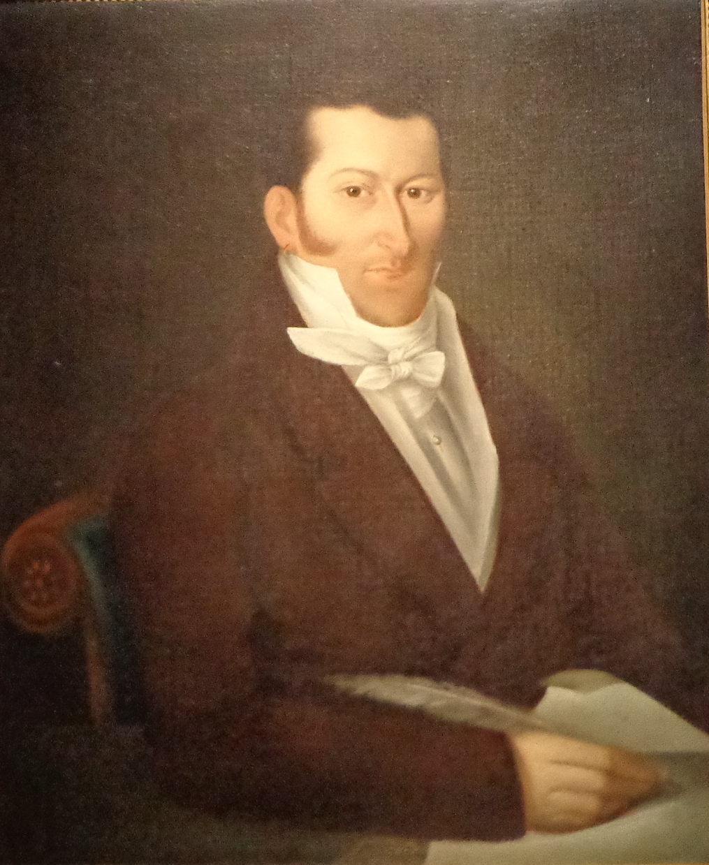 Auguste Ratisbonne (1770-1830)